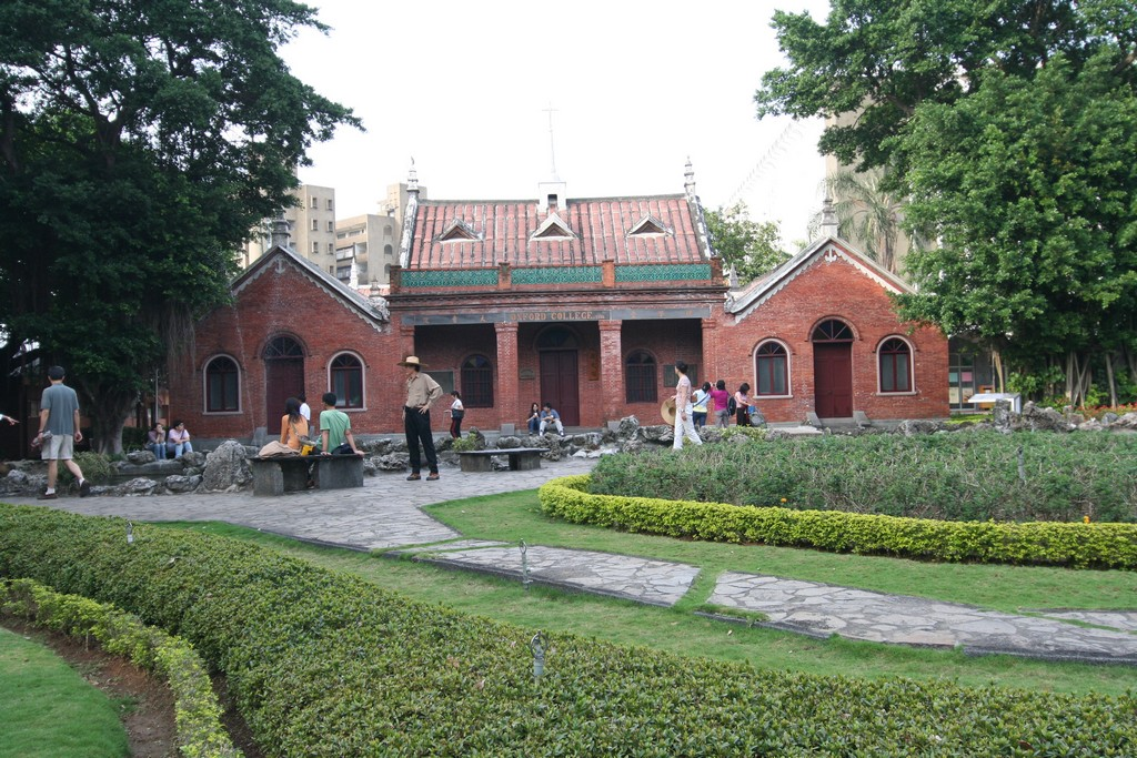 真理大學校本部牛津學堂。